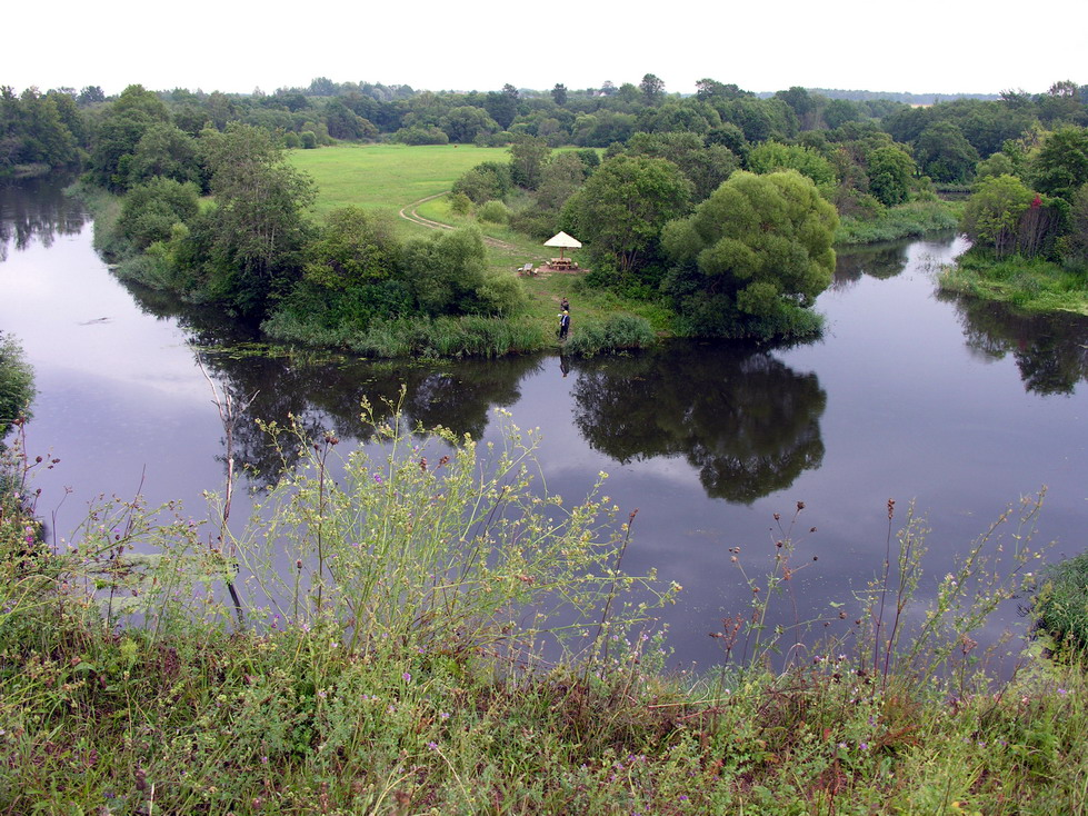 Virvytė, Mažeikių raj., Viekšnių seniūnija Virvytė ties Pavirvytės kaimu Foto: Algirdas, 2006 m. rugpjÅ«Ä io 15 d., Lietuva